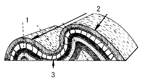 Hình mô tả các dạng và các đặc điểm của nếp uốn: (1)Trục nếp uốn, (2) Nếp uốn lồi, và (3) Nếp uốn lõm Nguồn: :commons:Antecline (PSF).png, có chỉnh sửa để xóa bỏ các ghi chú bằng tiếng Anh trên hình. Tác giả gốc Pearson Scott Foresman đưa nó vào phạm vi công cộng.